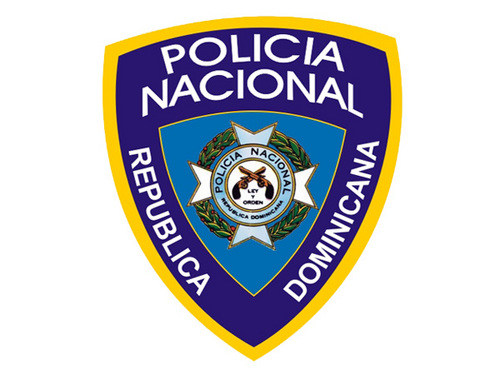 Policia Nacional Republica Dominicana